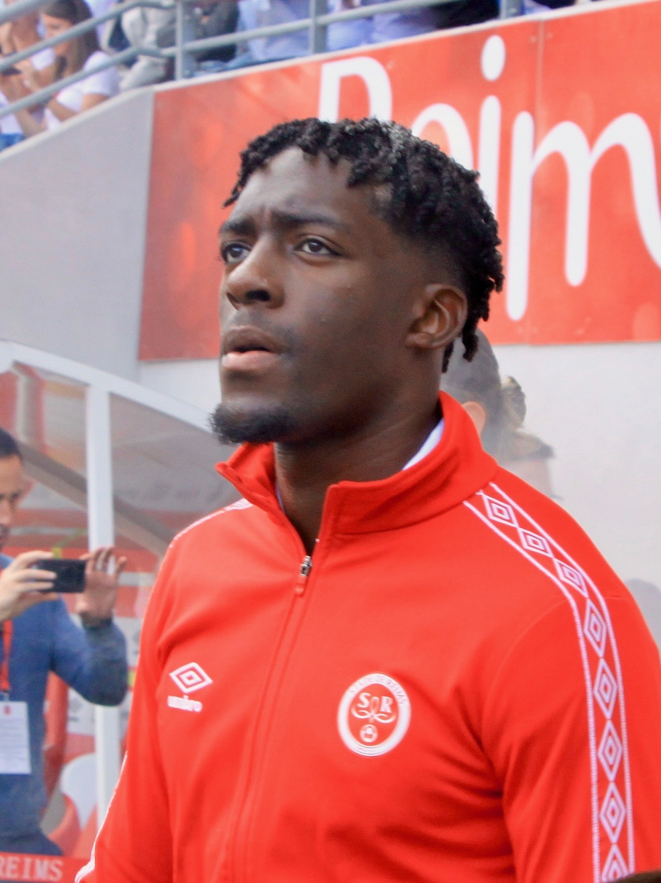 Axel Disasi, le 1er septembre 2019, avant Reims - Lille, Ligue 1.